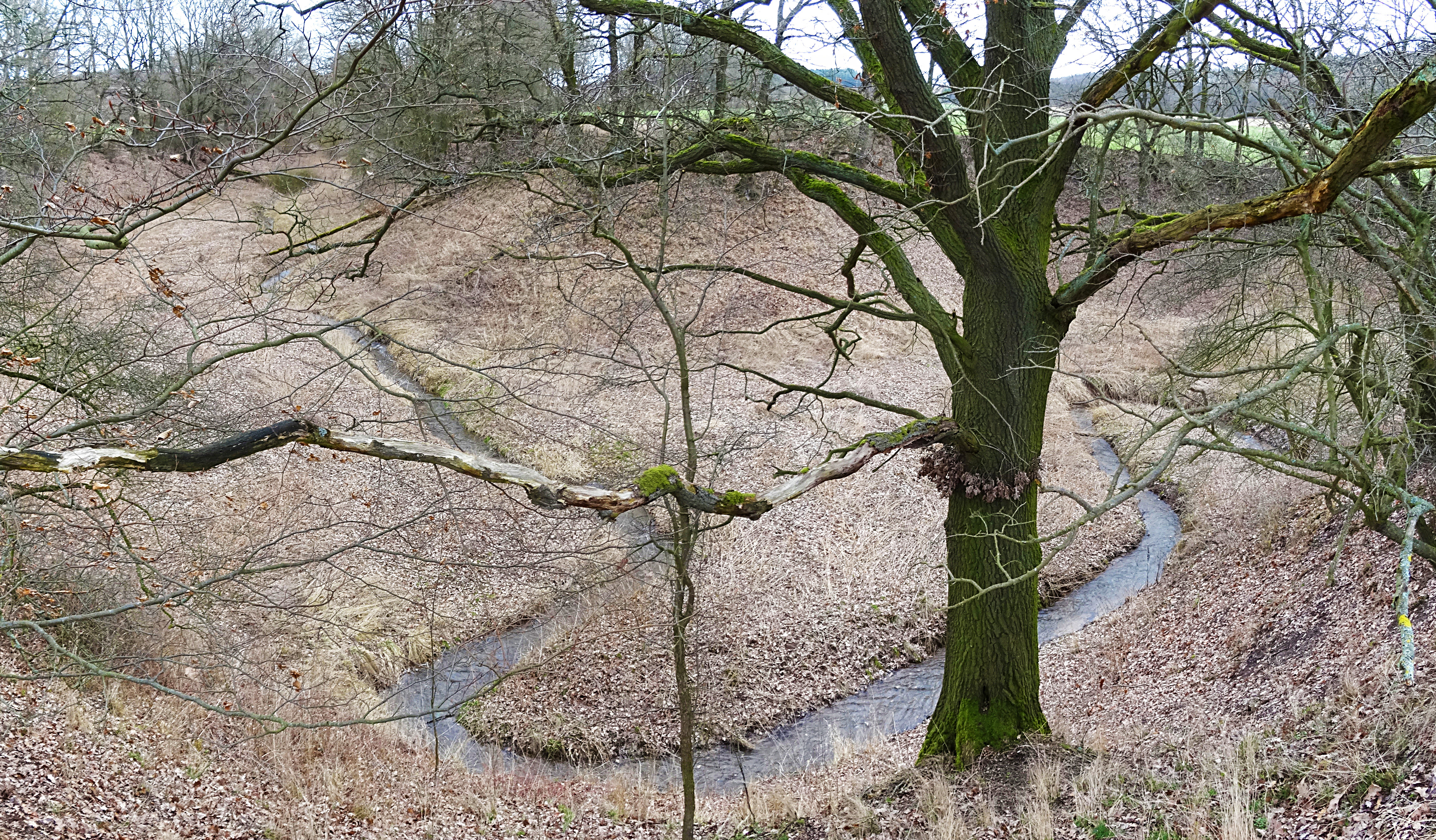 der Glasebach (Bauerngraben) am Übergang in den Periodischen See